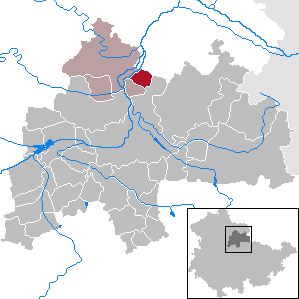 Büchel in Thuringia - District Sömmerda